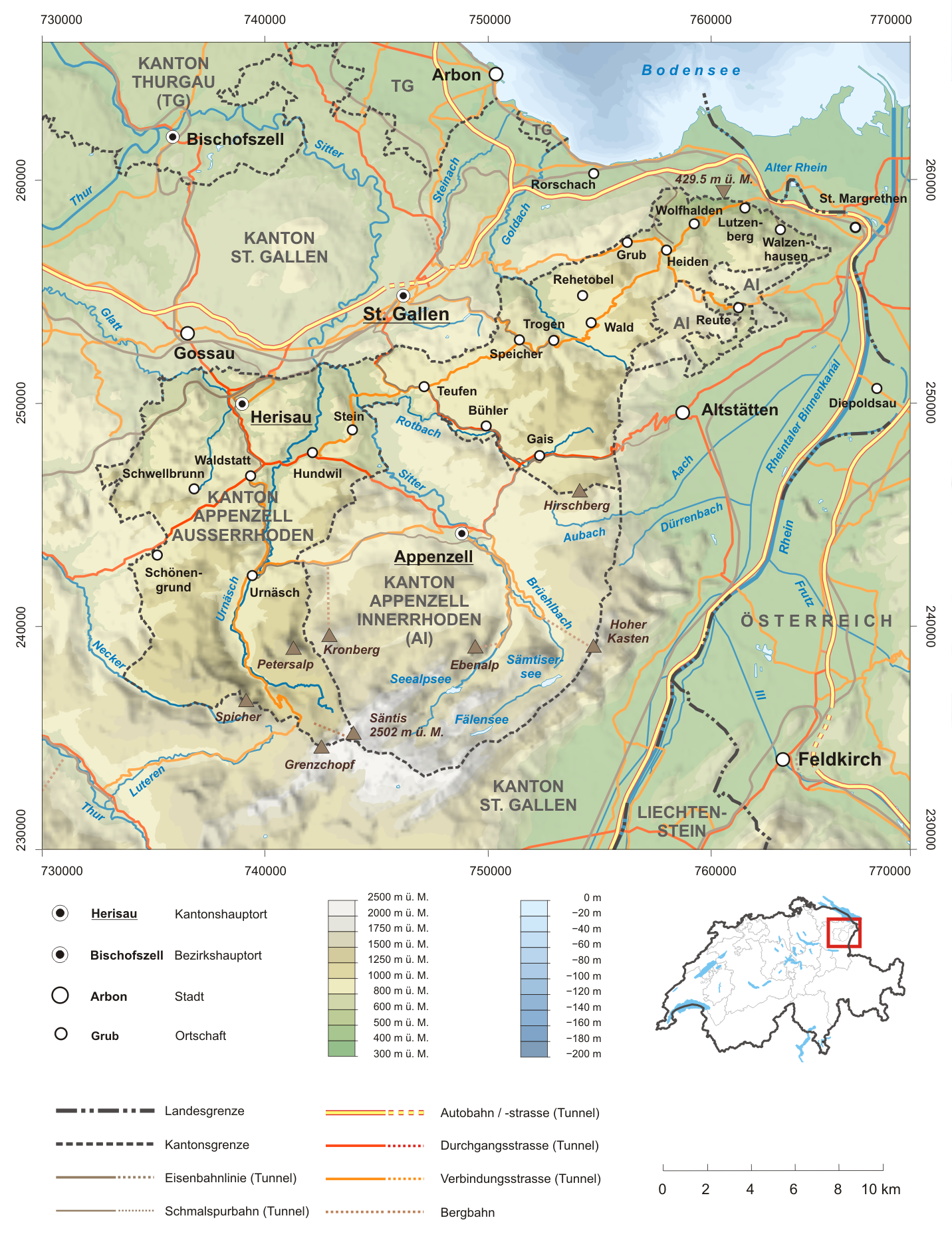 Karte des Kanton Appenzell Ausserrhoden. Topographischer Hintergrund: NASA Shuttle Radar Topography Mission (public domain). SRTM3 v.2.